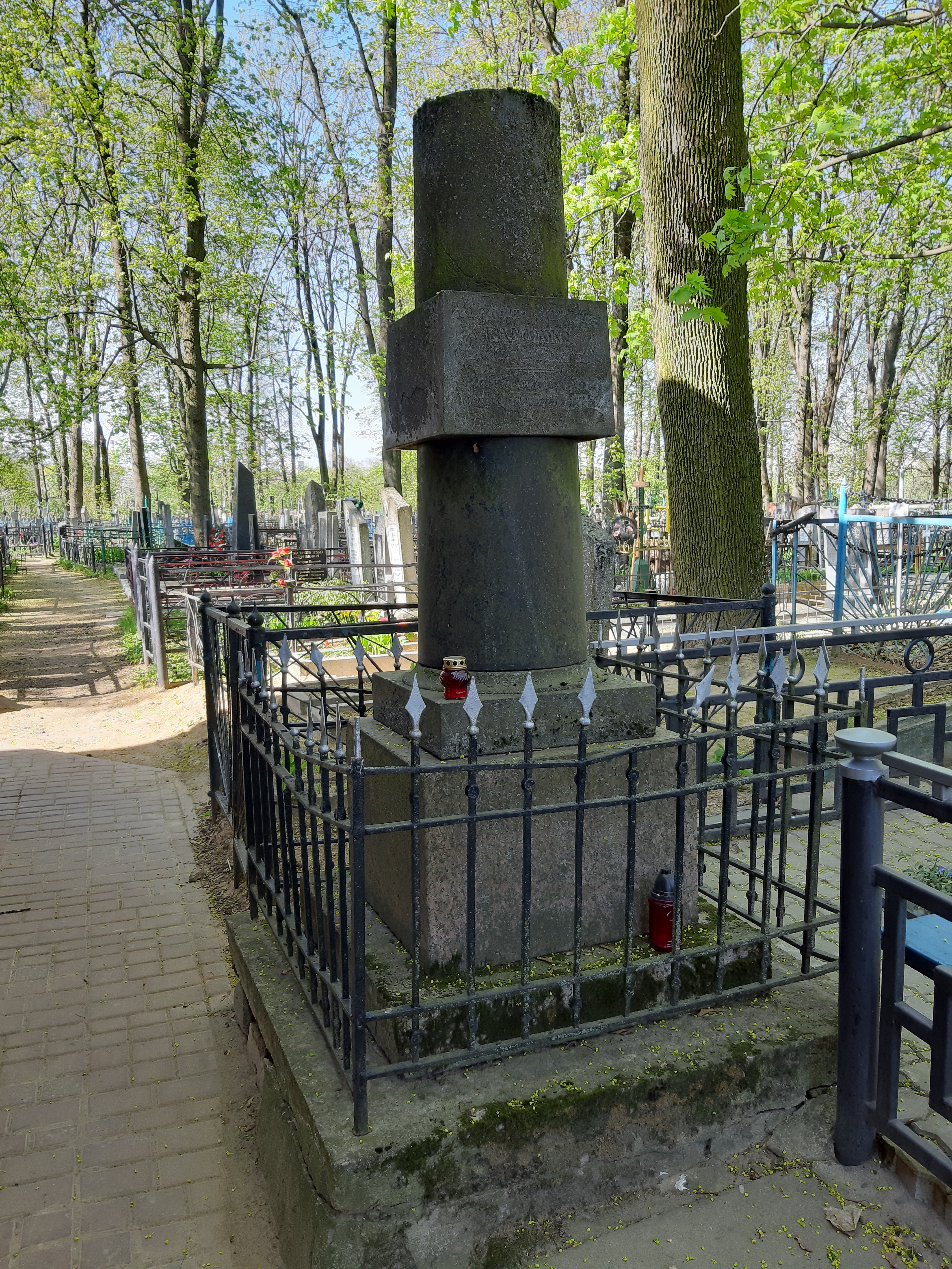 Магілёў. Польскі (Каталіцкія) могілкі